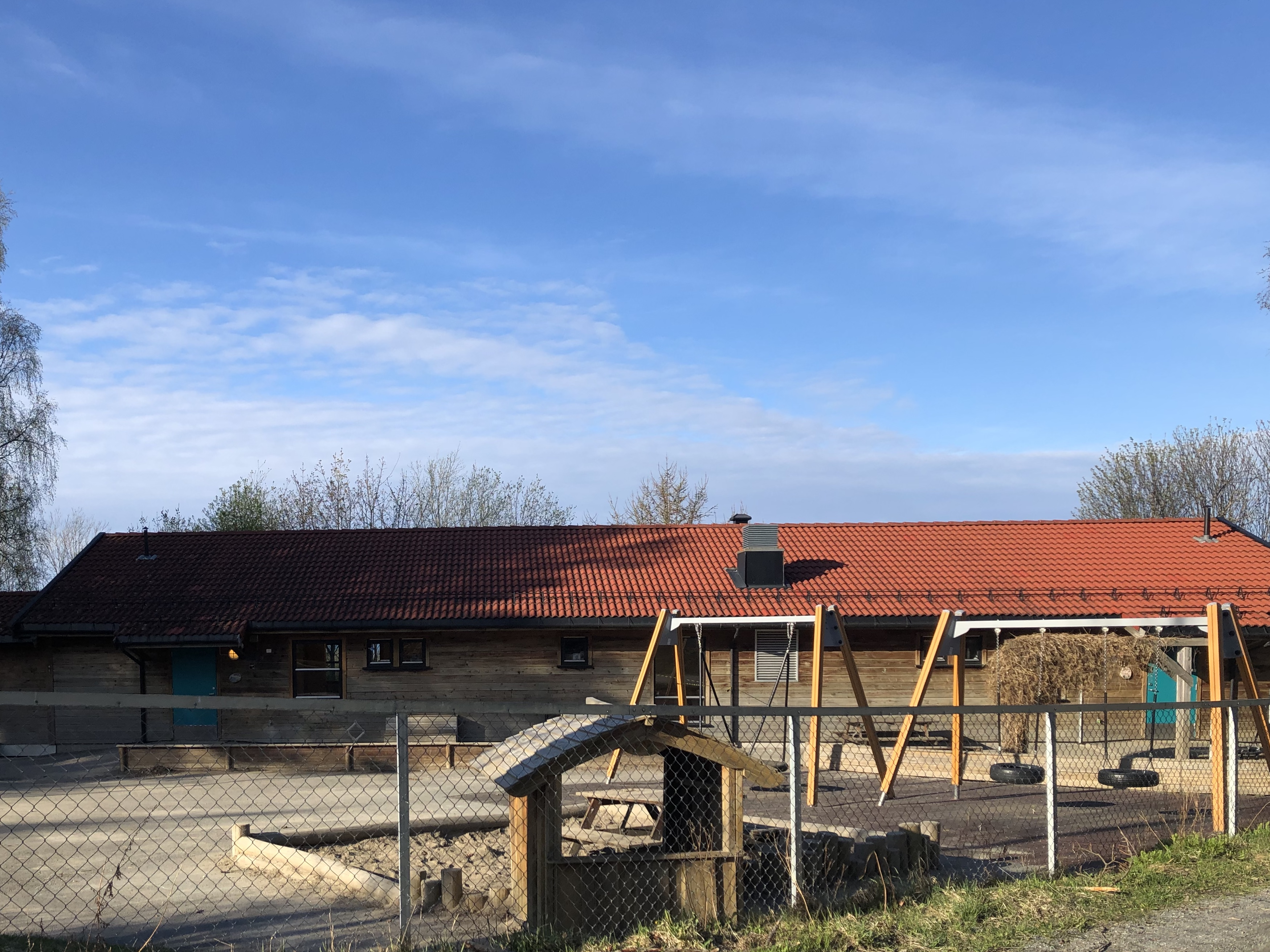 Smeden barnehage, Smeden 4, Ringerike